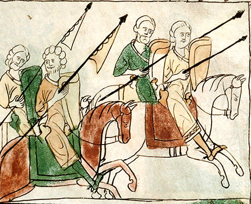 Caballería en una Biblia ilustrada navarra (Pamplona, 1197)